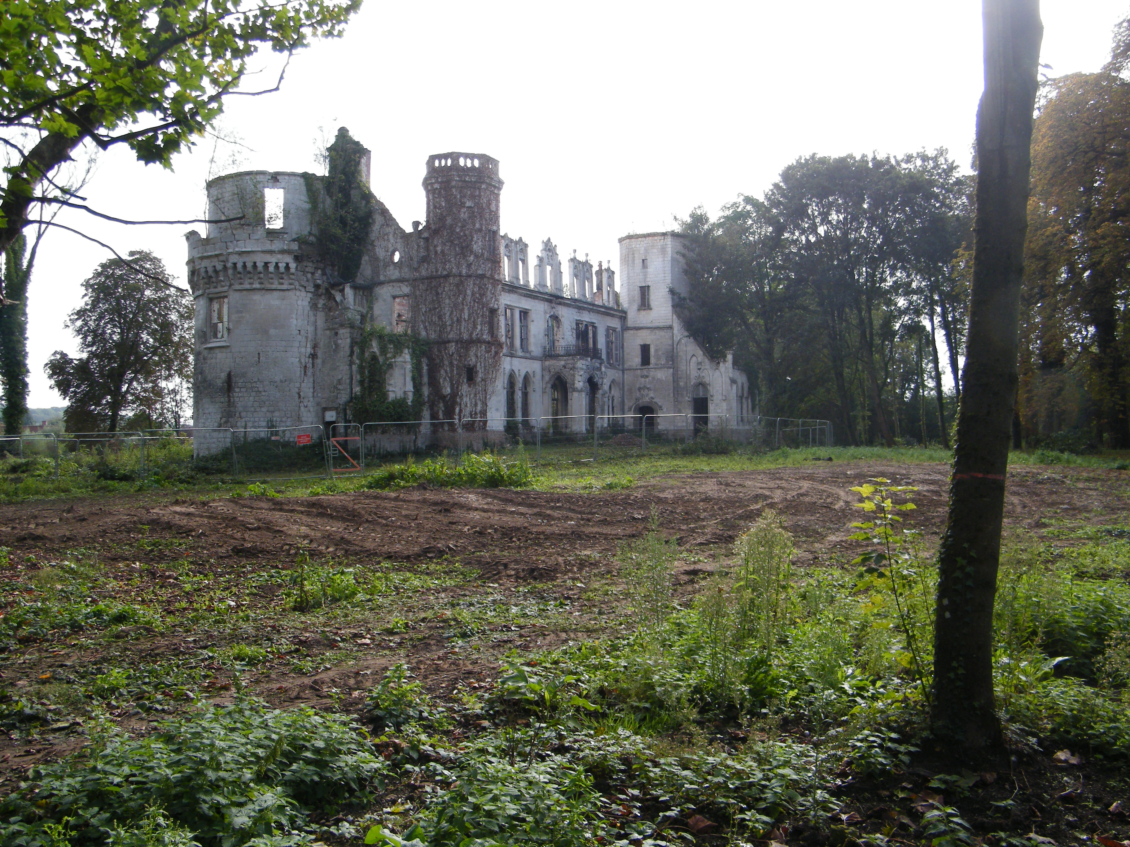 Pont-Remy, Somme, Fr, château, état en septembre 2016.